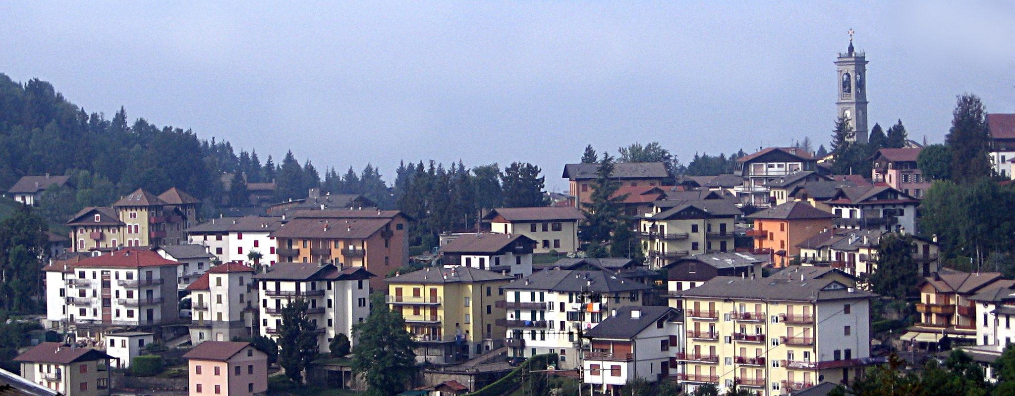 Selvino, Bergamo, Italia